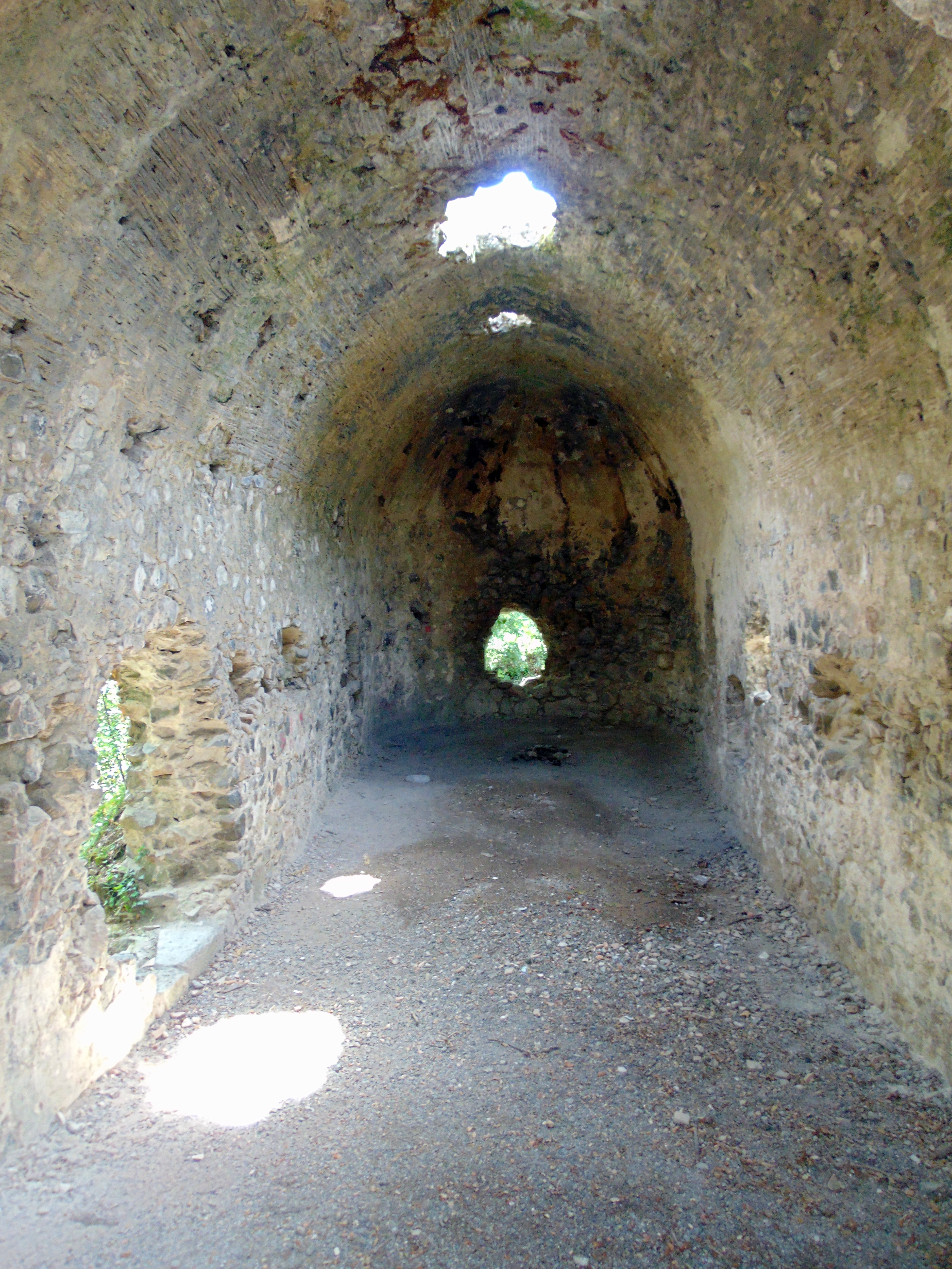 Ermita de Sant Llop (Vilobí d'Onyar)